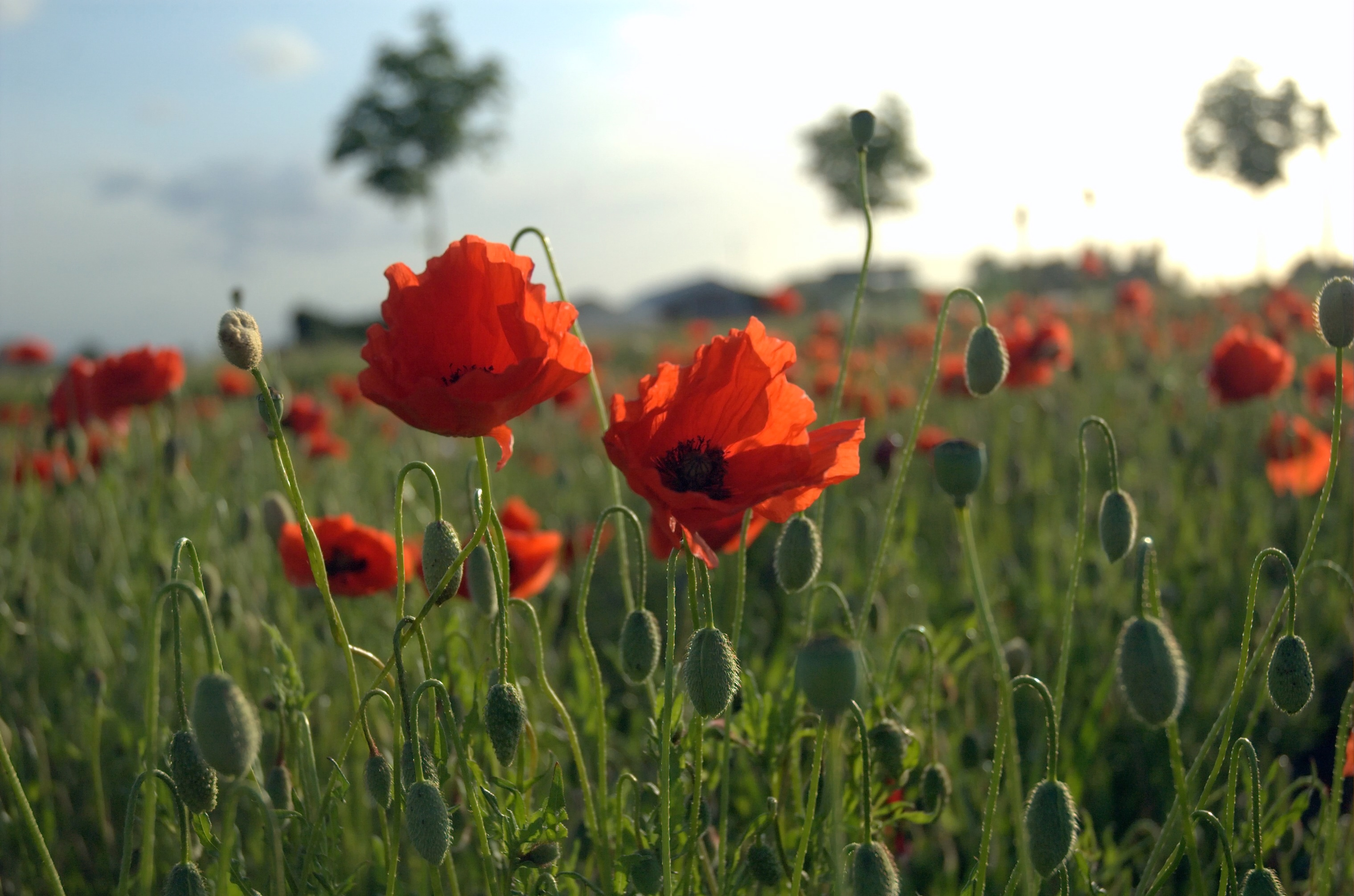 Mohnblumenfeld in Flandern, Belgien.